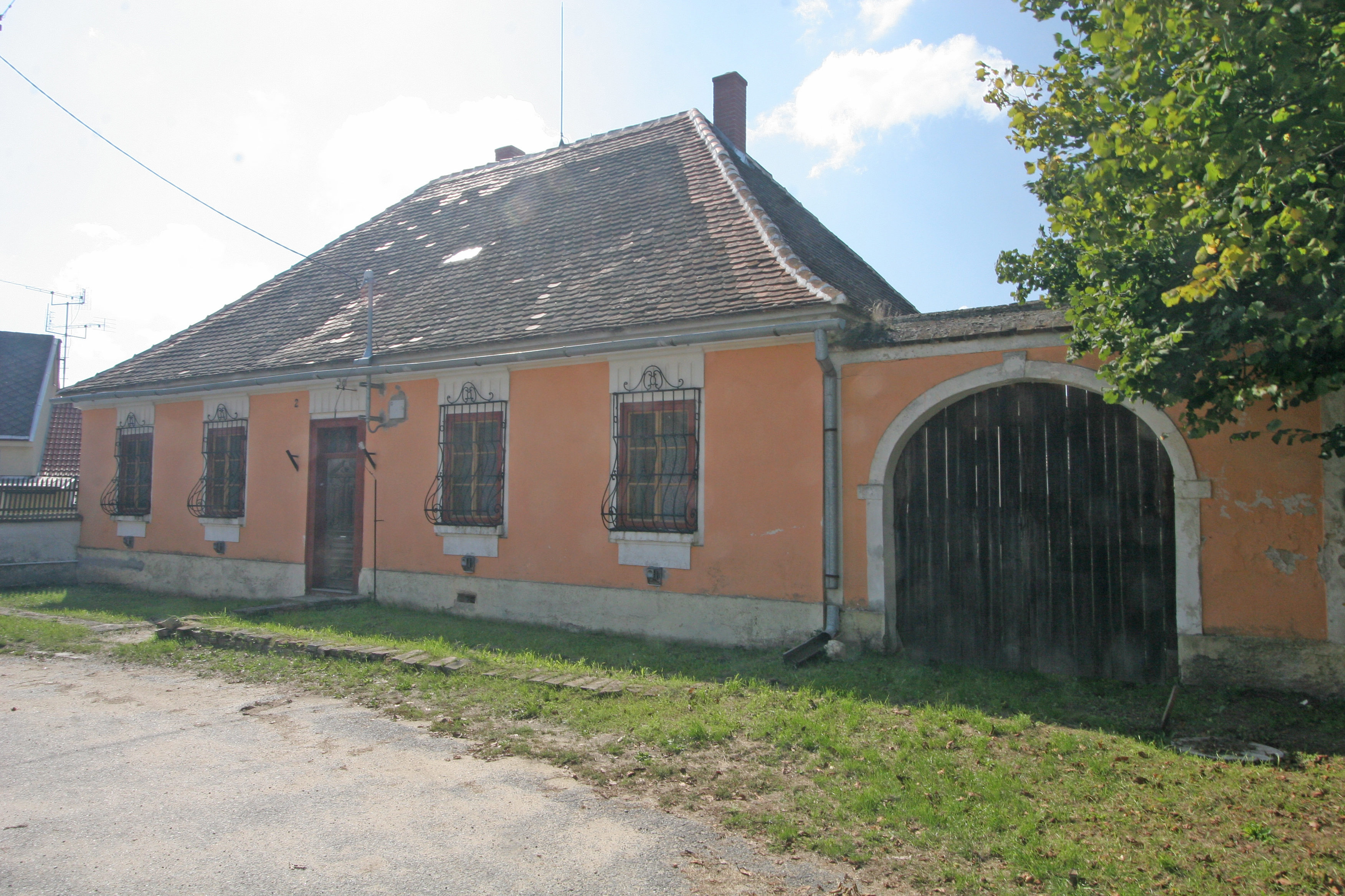 Chvalatice čp. 2